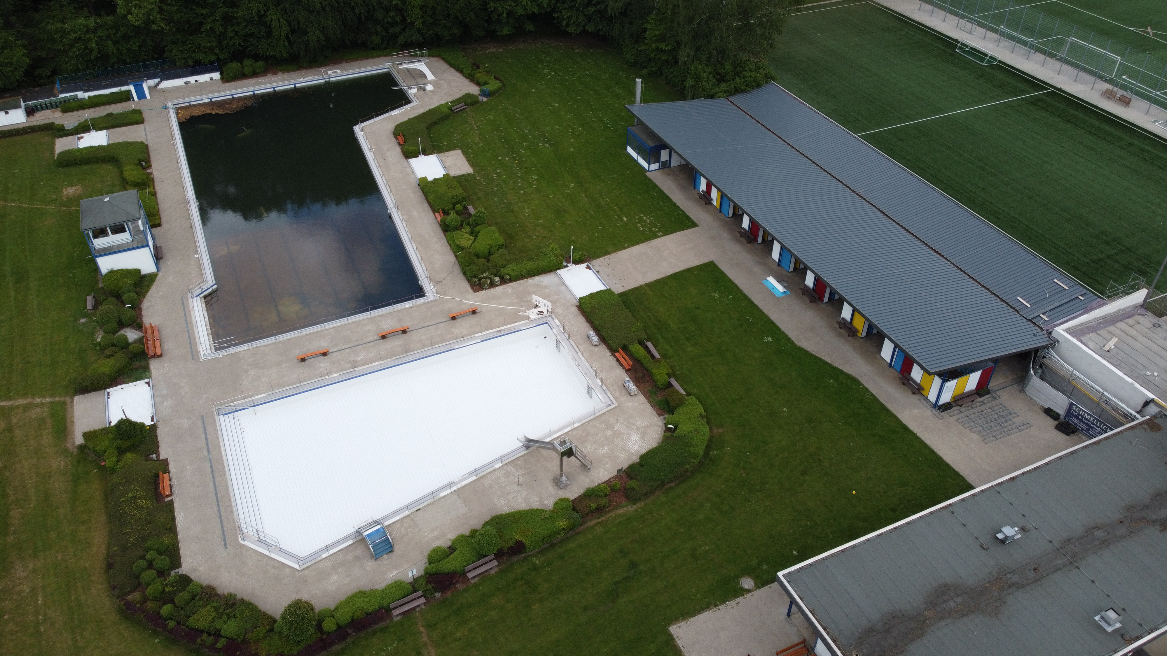 Freibad Elverdissen